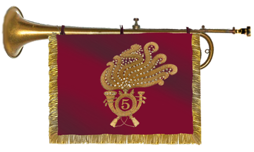 Drappella fanfara reggimentale del 5° Reggimento bersaglieri. (versione priva del motto, databile presumibilmente prima del 1932)